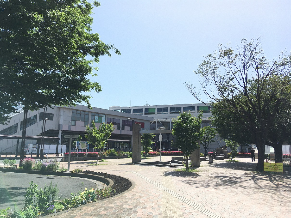 玉川上水駅北口広場